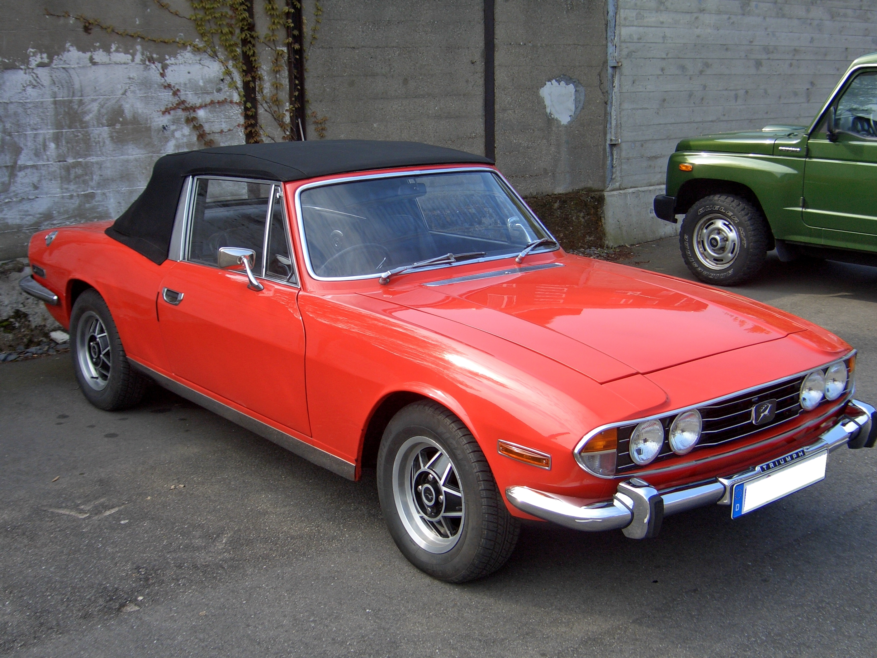 Triumph Stag, 1970-1977